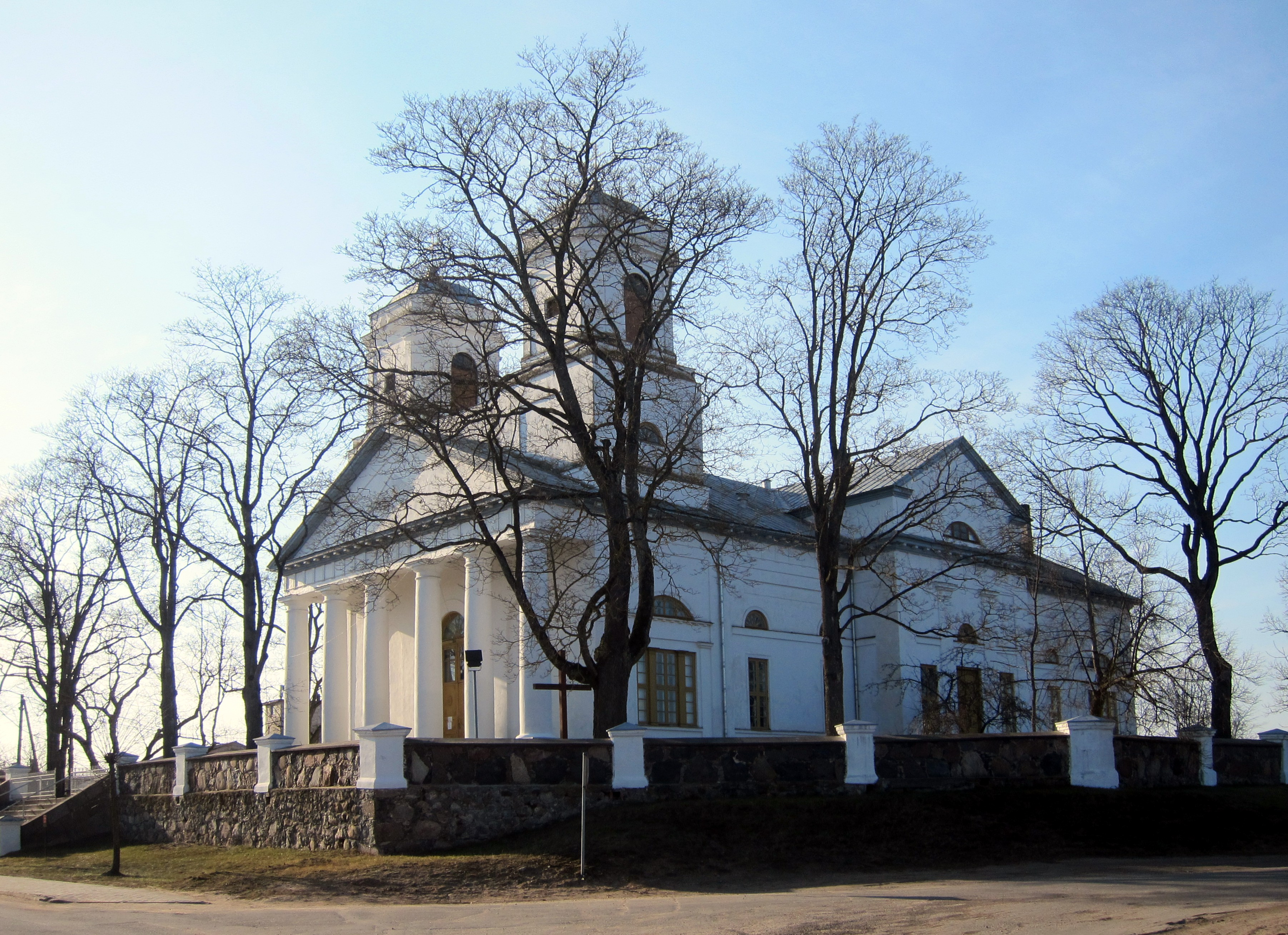 Varakļānu katoļu baznīca, Varakļāni, Rīgas iela 2